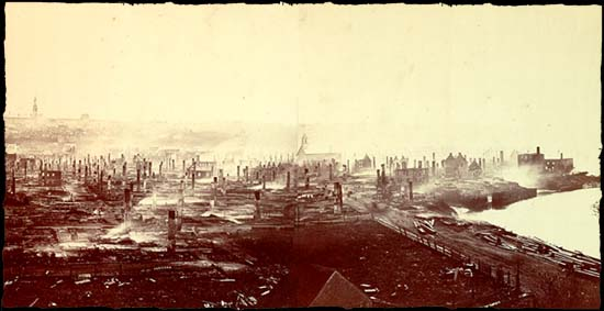 Incendie de Québec en 1866.